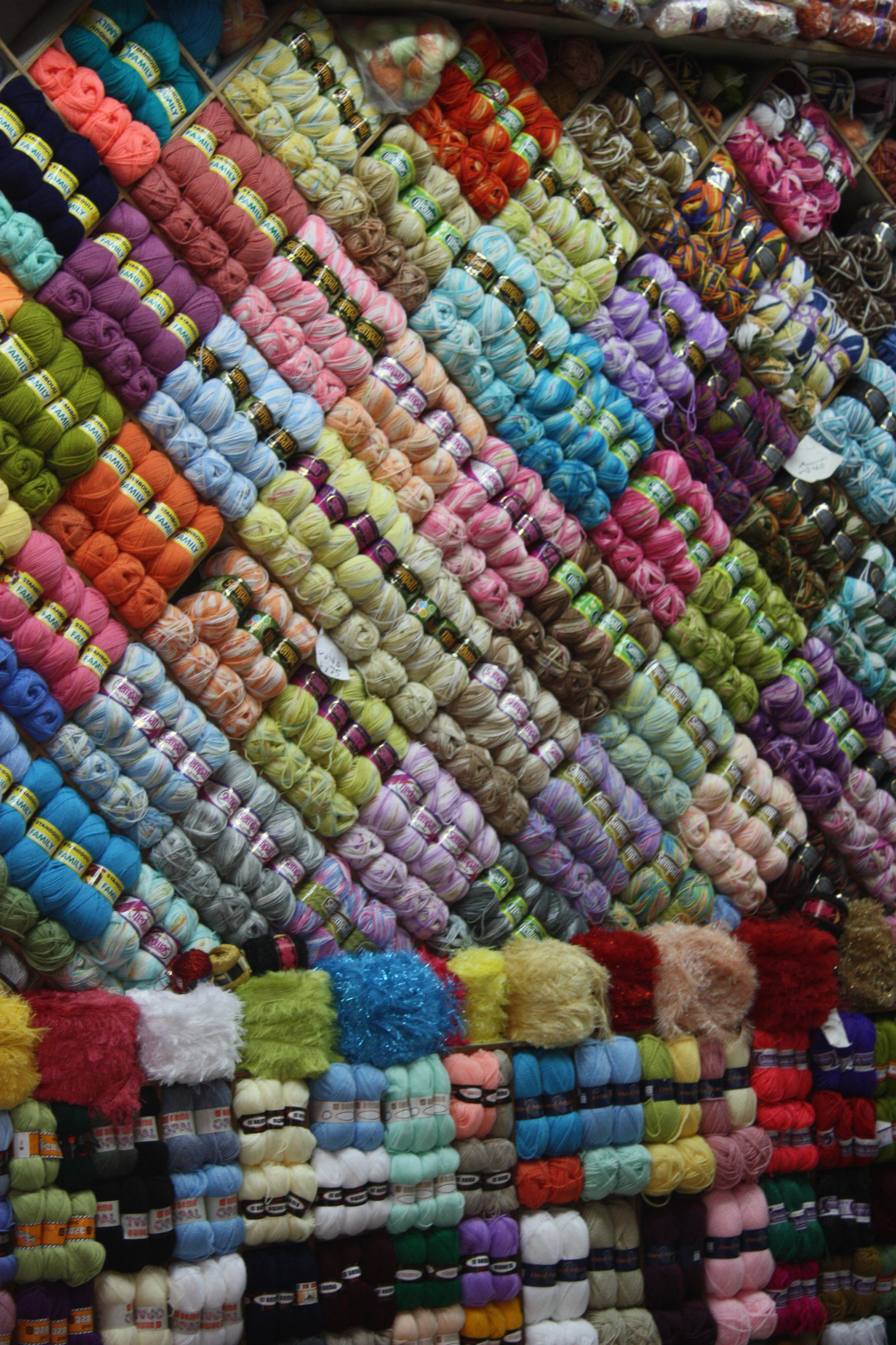 Aleppo, souq